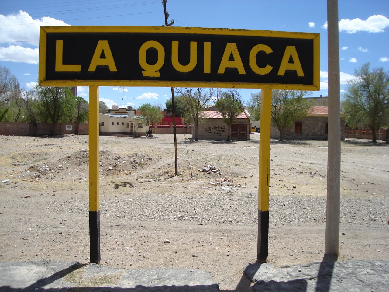 Cartel nomenclador de la Estación La Quiaca del Ferrocarril General Manual Belgrano, ubicado en la ciudad homónima, departamento Yavi, provincia de Jujuy, Argentina.